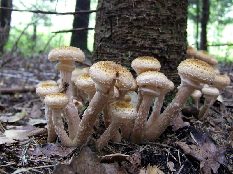 Armillaria ostoyae. Karmėlava forest, Lithuania.